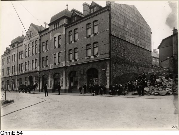 Sjömannasällskapets hus, Fjällgatan 26, Göteborg. Fotograf Aron Jonason. GSM.